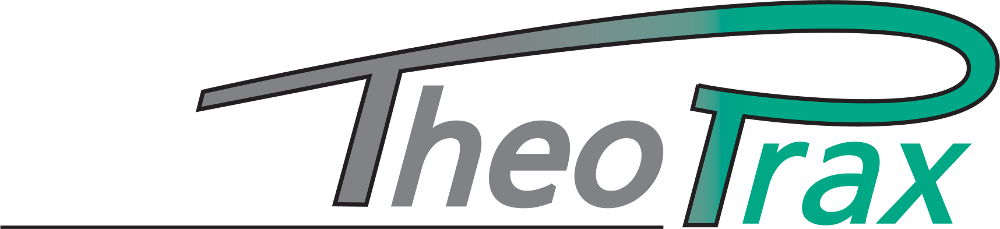 Das Logo der Lehr-Lern-Methodik TheoPrax.